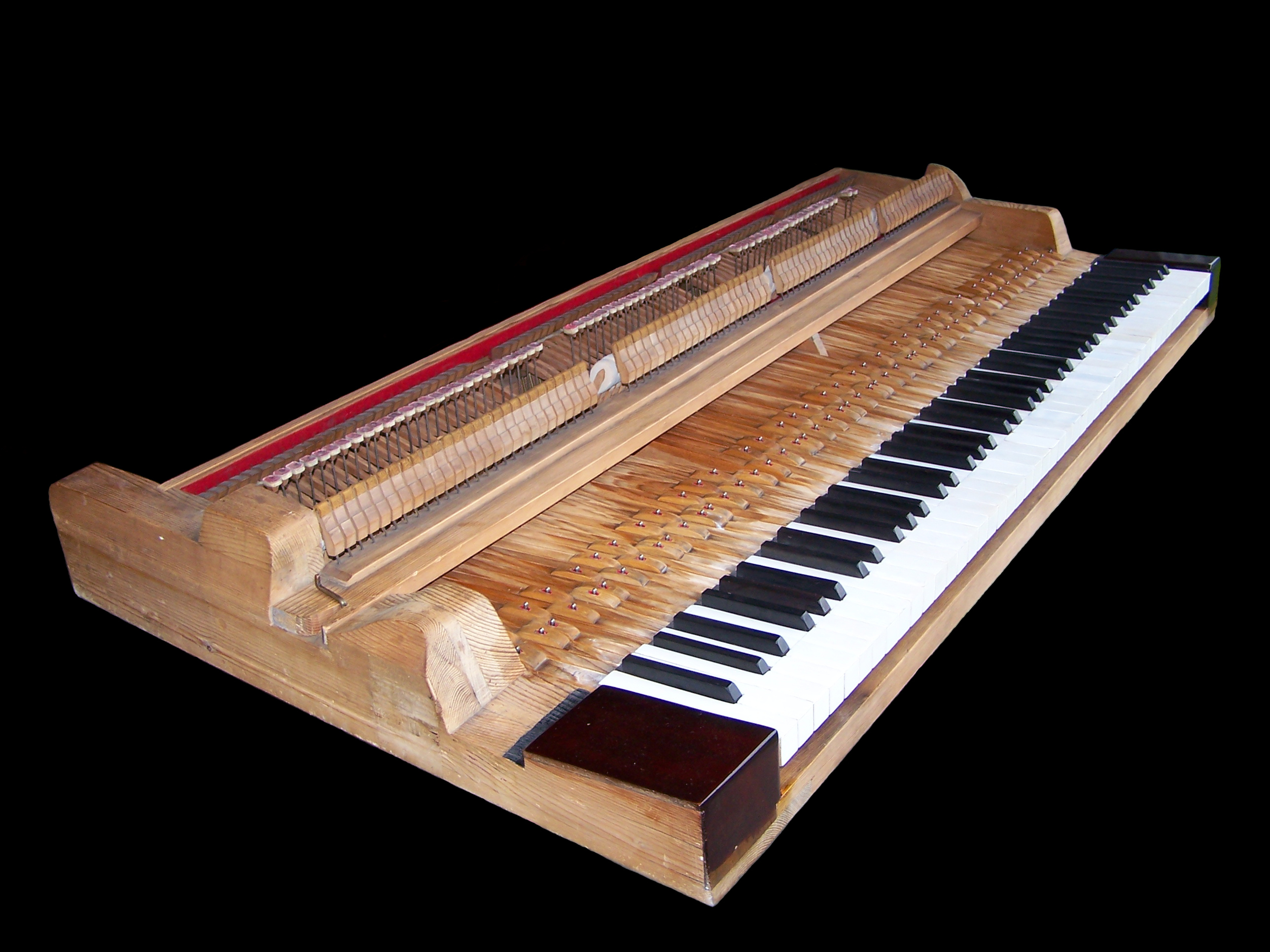 Mechanizm fortepianu wiedeńskiego.